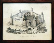 La Maison-Fort d'après une reconstitution, gravure, 19e siècle, représentant le château de La Maison-Fort en Puisaye avant la Révolution française au cours de laquelle il fut confisqué, déclaré bien national, aliéné et démantelé pour la récupération et la vente des matériaux. Vestiges en cours de restauration à l'initiative de l'association de sauvegarde du patrimoine et des traditions, crée en 2016 sous la dénomination "Les Amis de Maison-Fort", La Maison-Fort, Bitry, Nièvre, France.